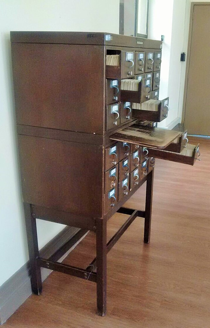 Ficheros bibliográficos de la Biblioteca Nacional ubicados en la Sala Daniel Samper Ortega